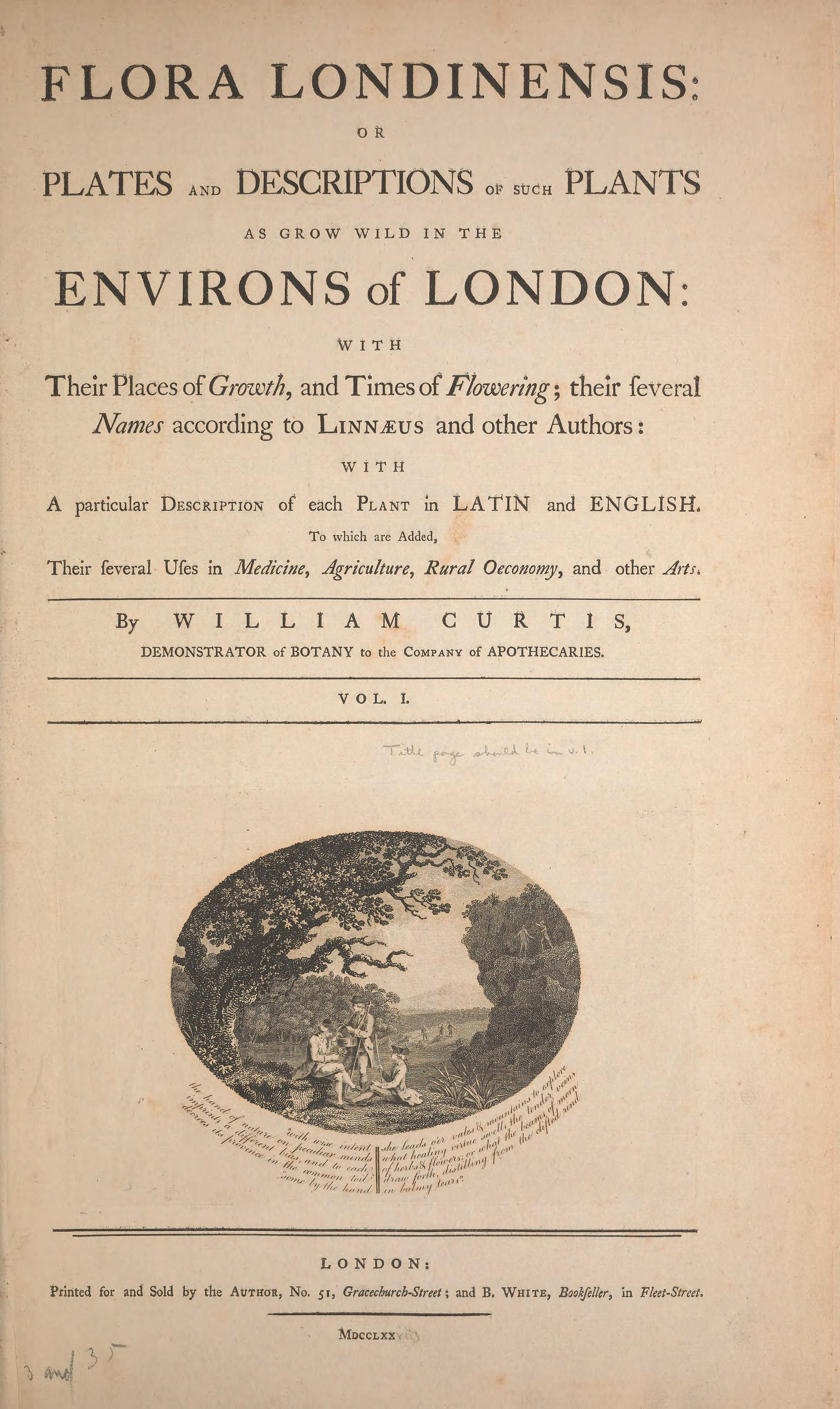 William Curtis, Flora Londinensis, 1770, title page